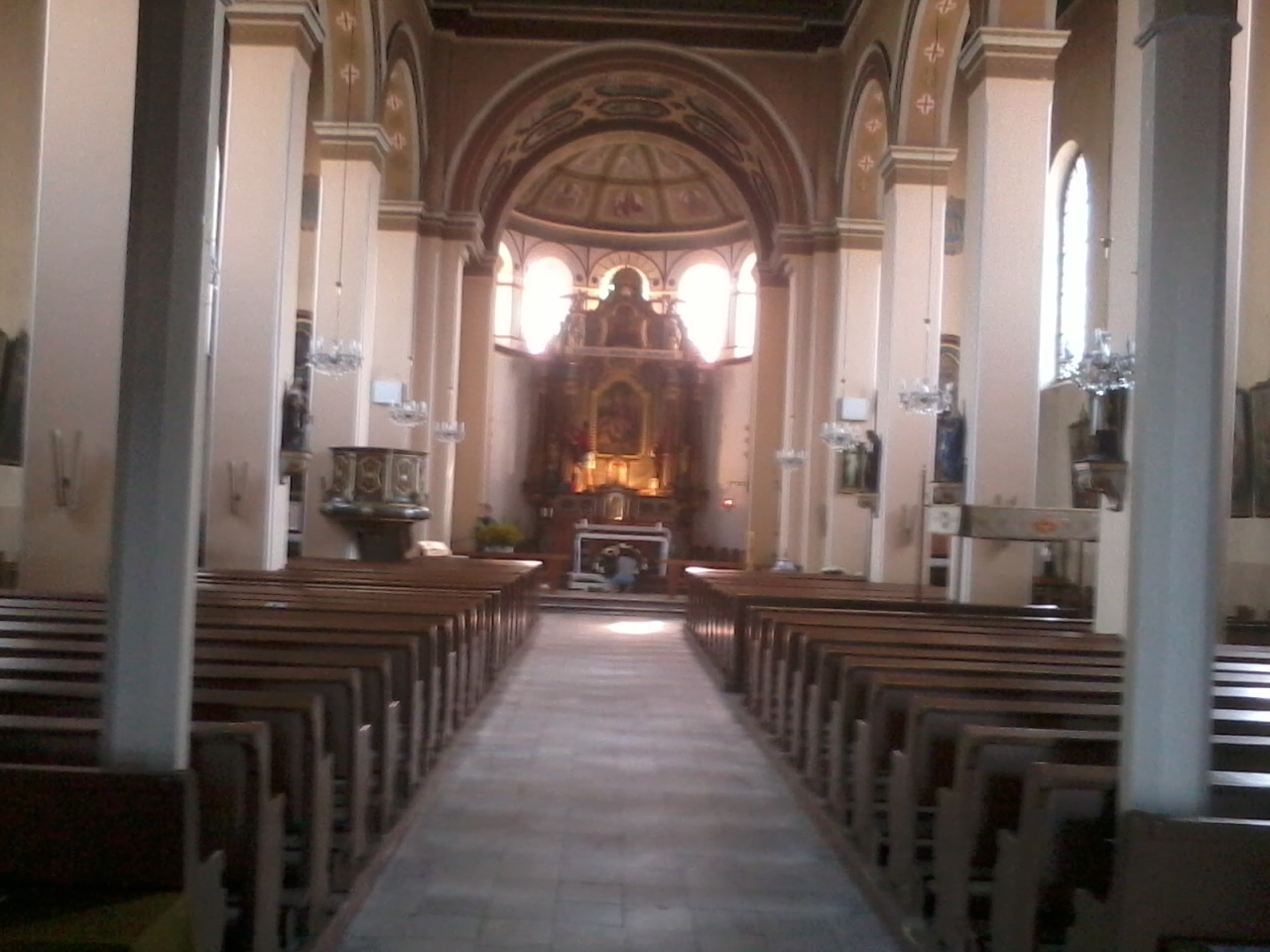 Nawa główna